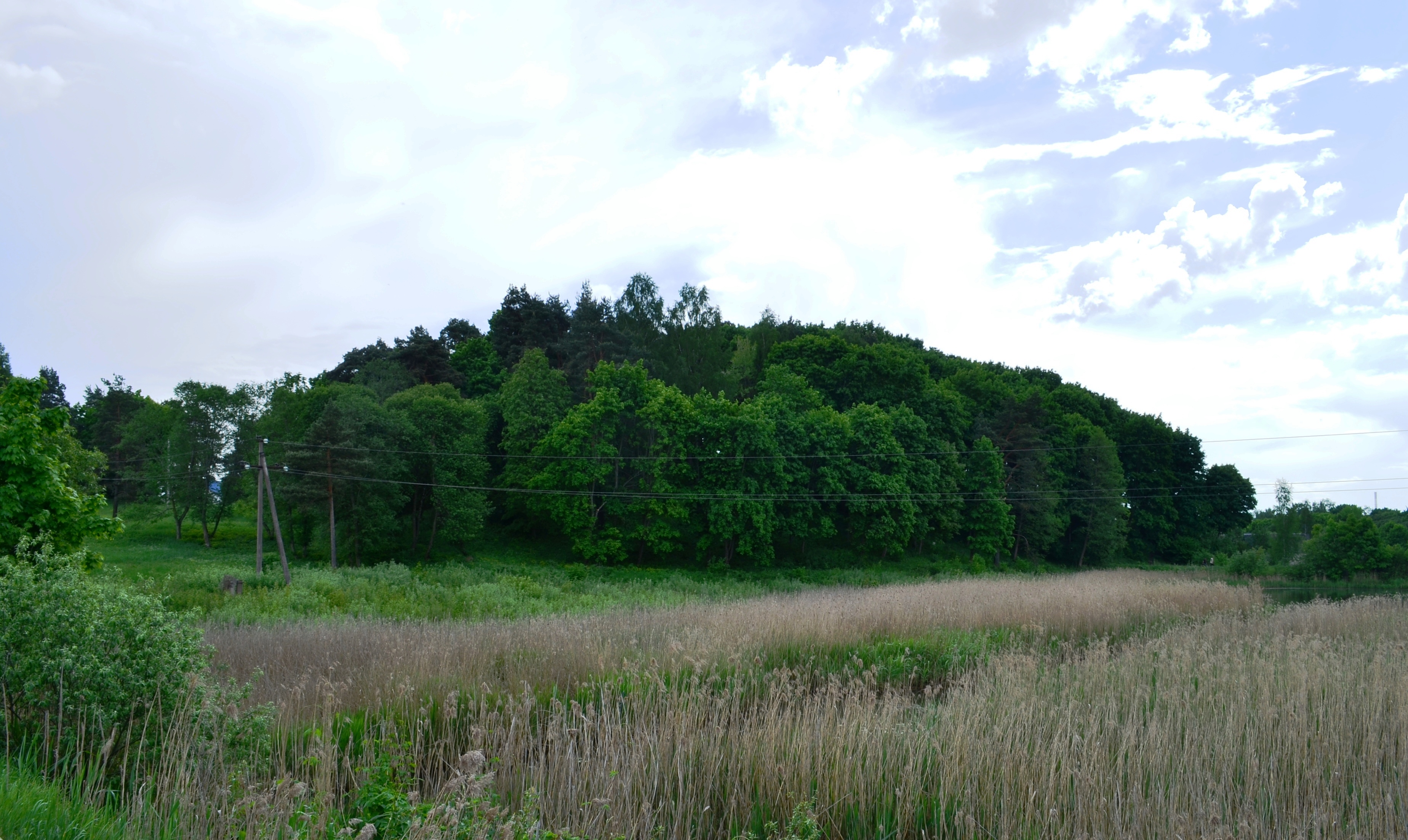 Pilaitės piliakalnis, Pilaitė, Vilnius